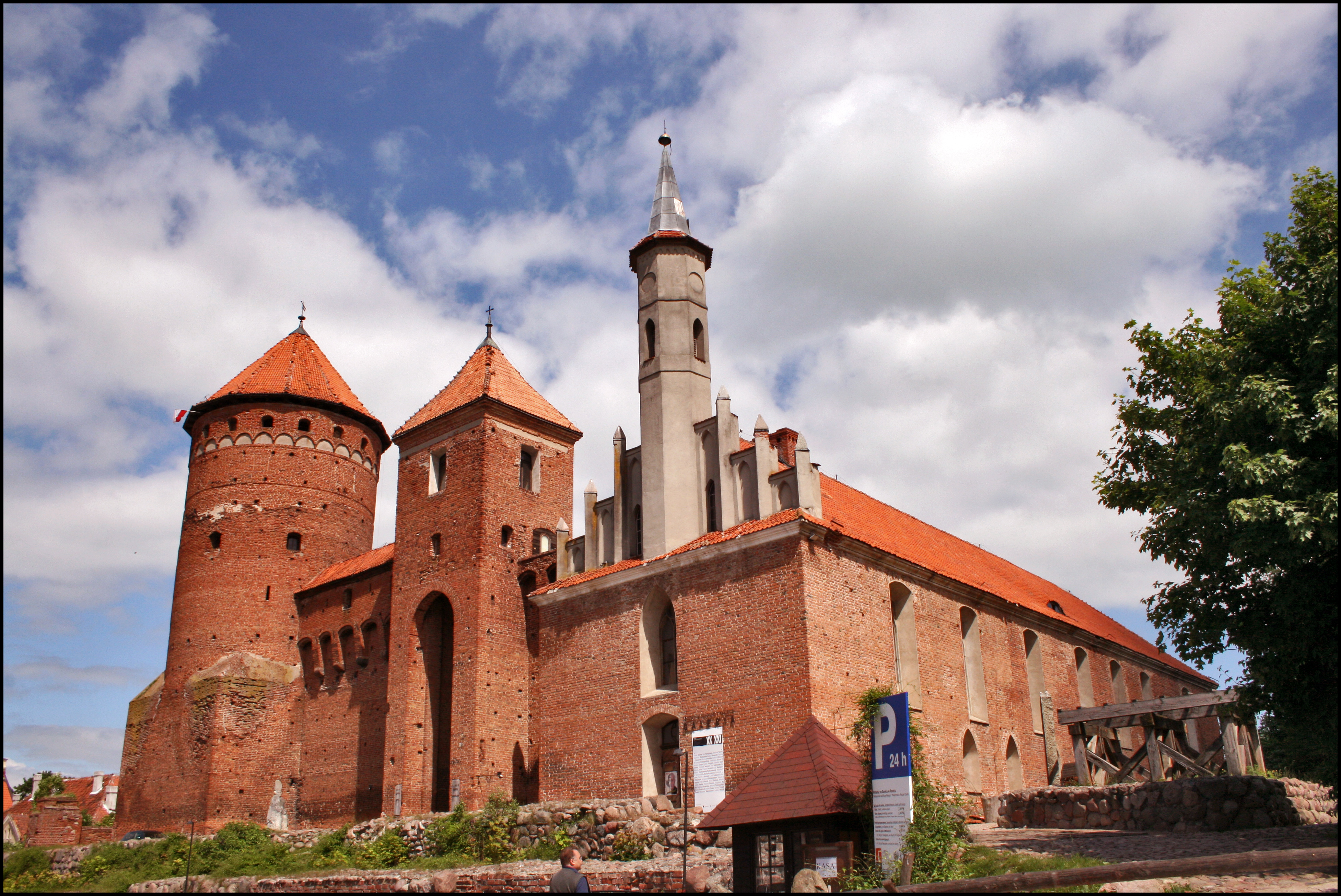 Reszel - Zamek biskupi